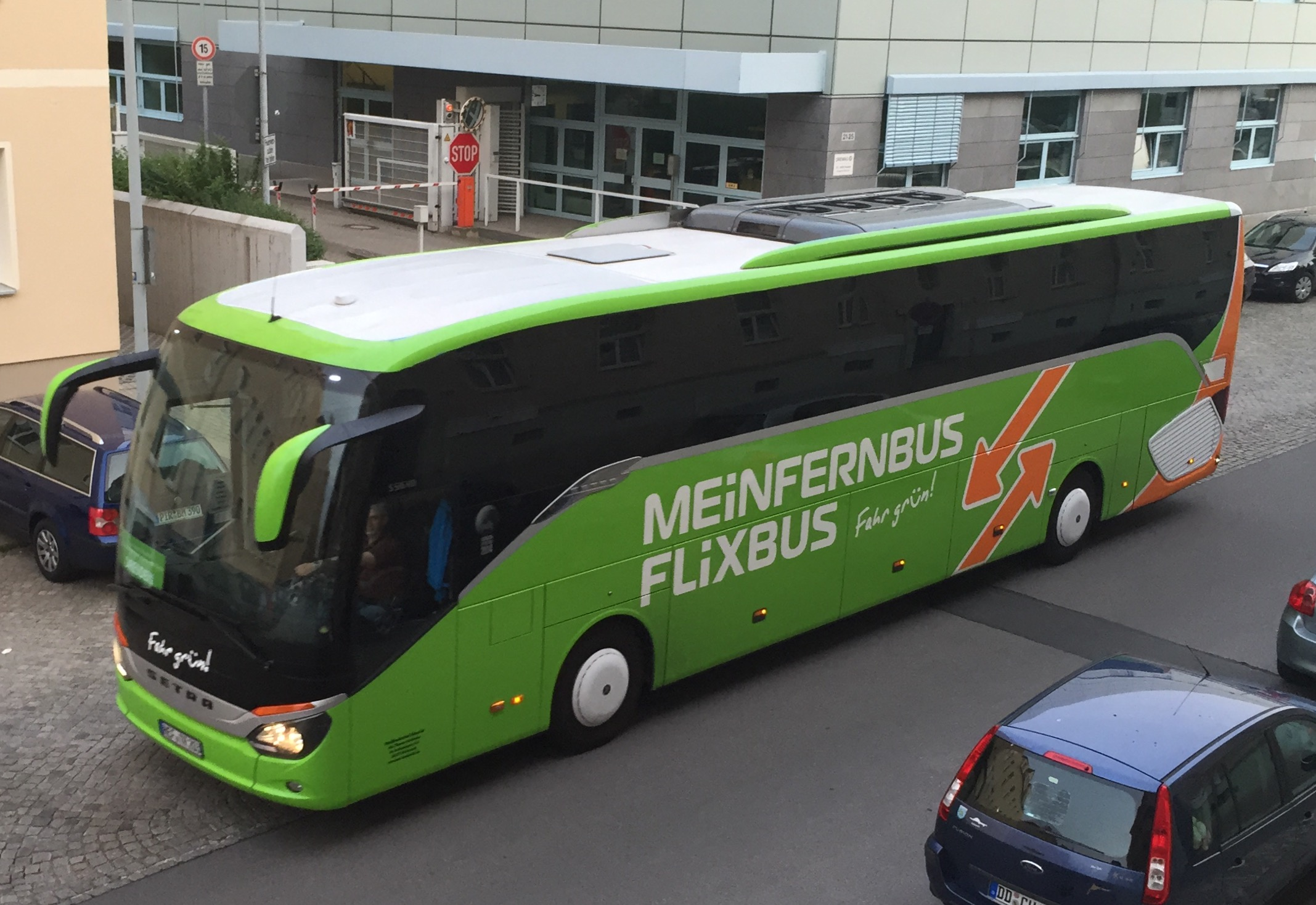 meinfernbus flixbus bus